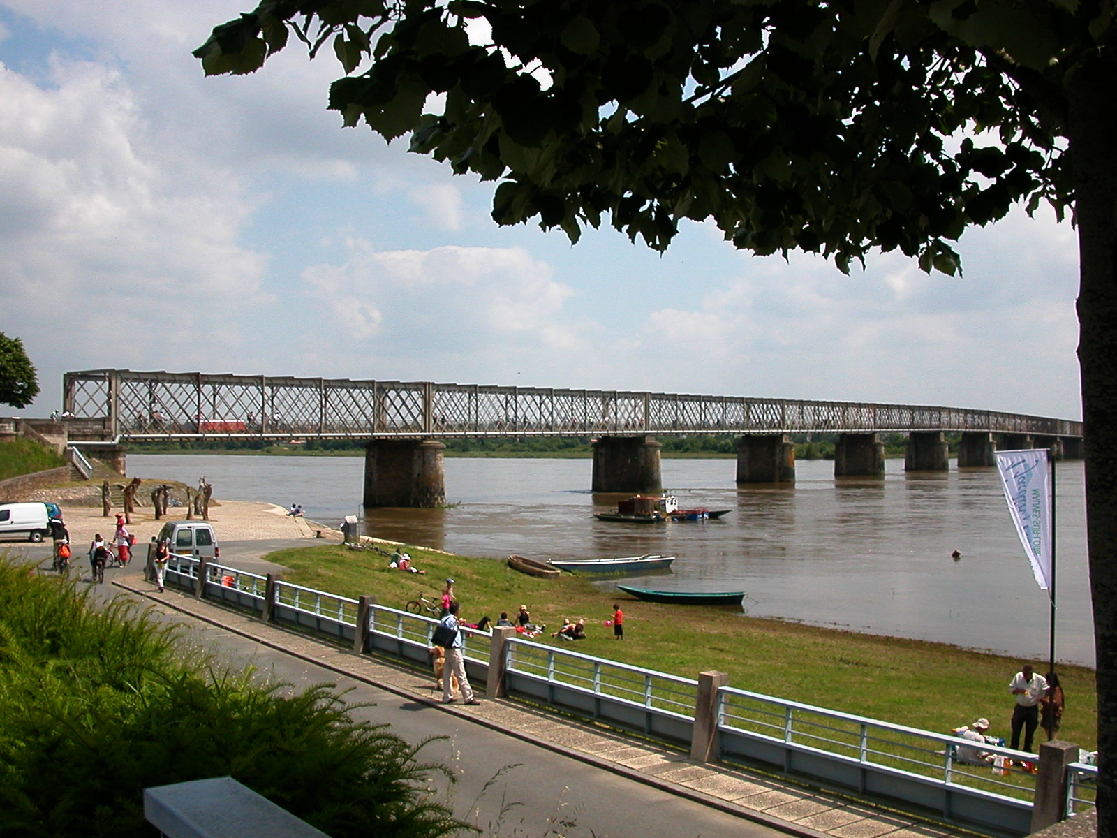 Le pont de Mauves vus depuis la rive nord de la Loire à Mauves-sur-Loire